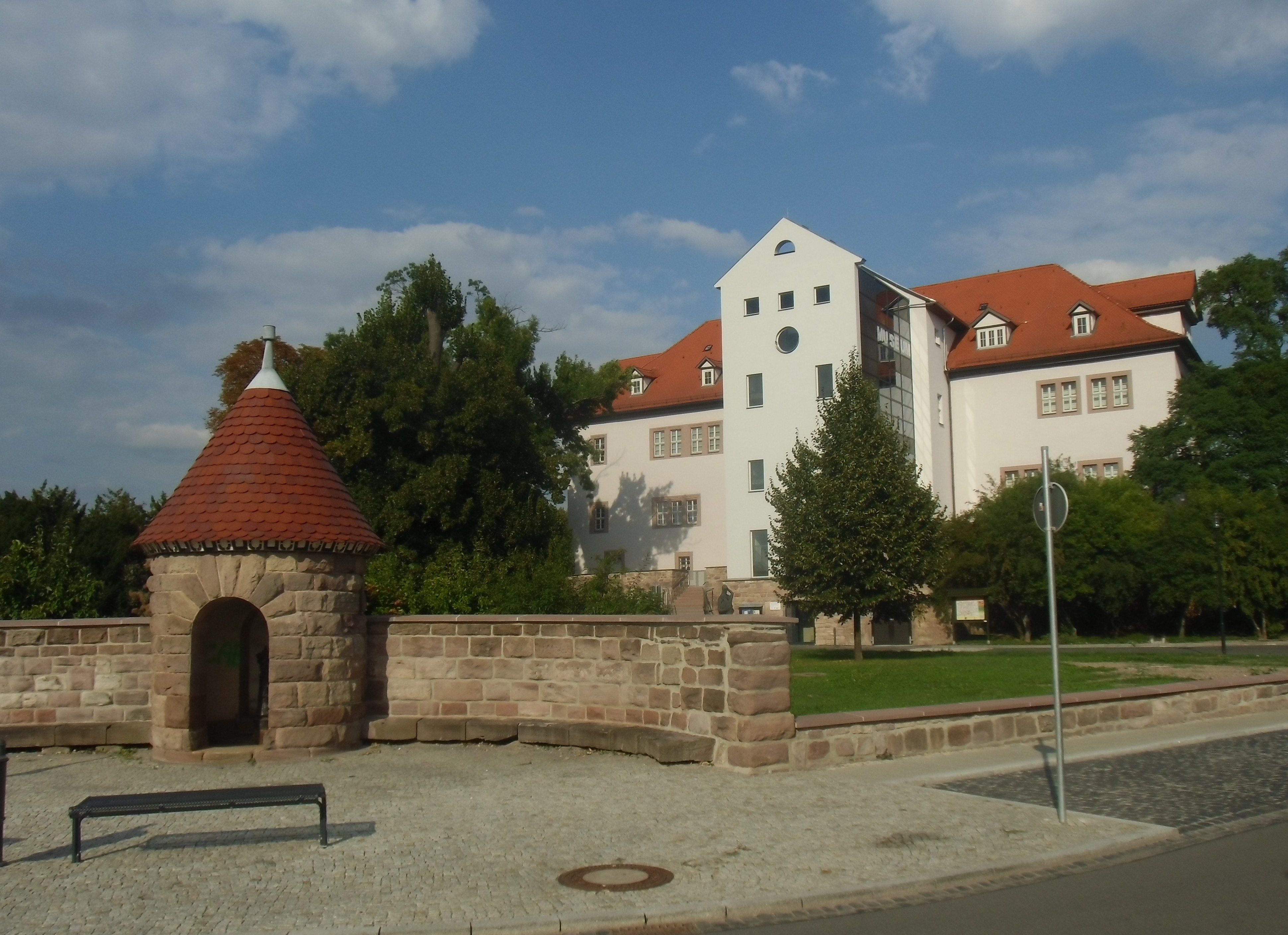 Schloss Frankenhausen von der Schloßstraße aus gesehen,erbaut im 16.Jahrhundert, war Sitz der Fürsten zu Schwarzburg-Rudolstadt und ist heute Sitz des Regionalmuseums Bad Frankenhausen